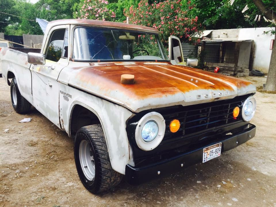 Dodge D100 Pick Up 1967 .